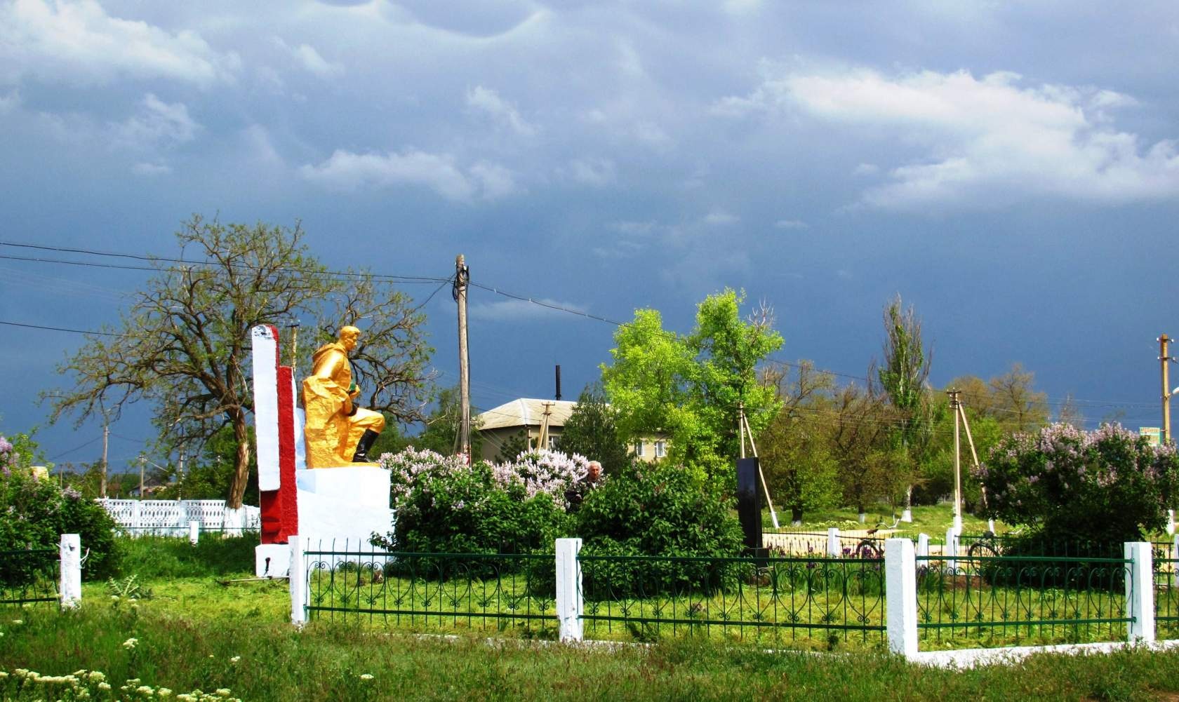 Памятник павшим в ВОВ. Село Новоукраинка.